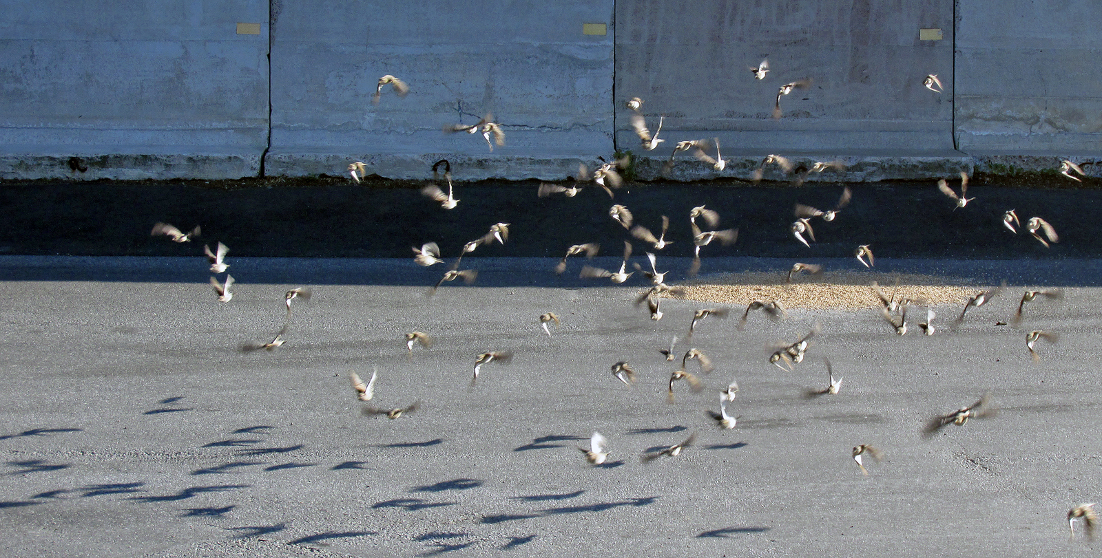 En flock Gråsparvar har ätit från en hög med spillsäd vid Lantmännens silos i Ystad.